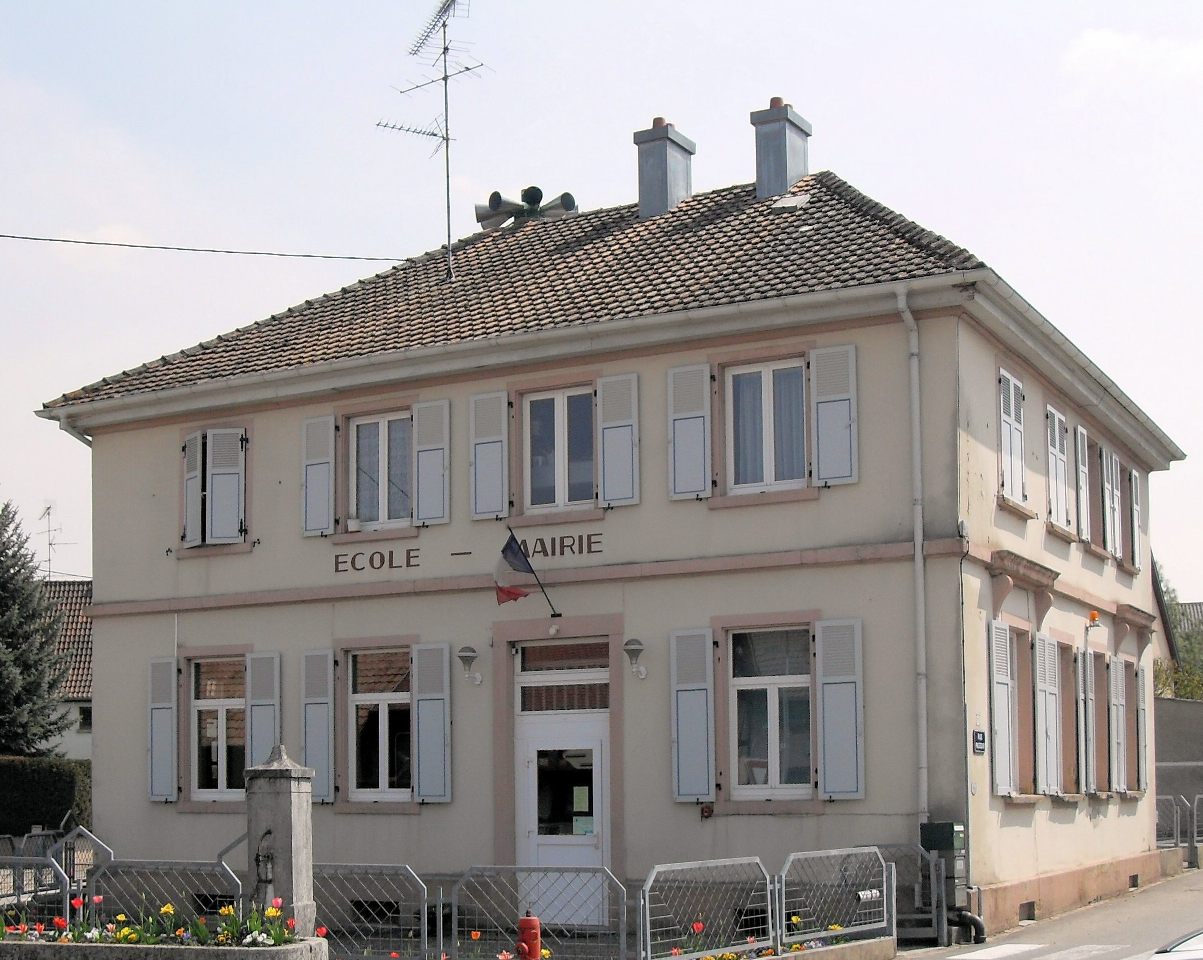 Mairie-école de Zaessingue